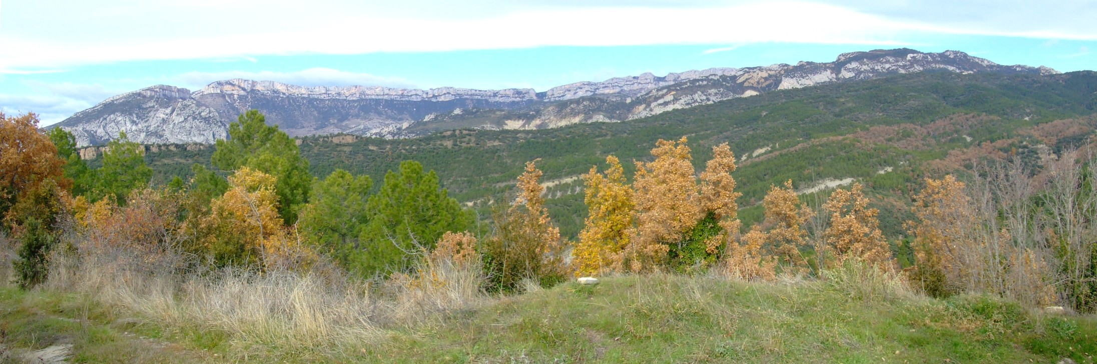 Panoràmica de les serres de Carrànima (primer terme) i de Carreu (fons) (Abella de la Conca, Pallars Jussà)